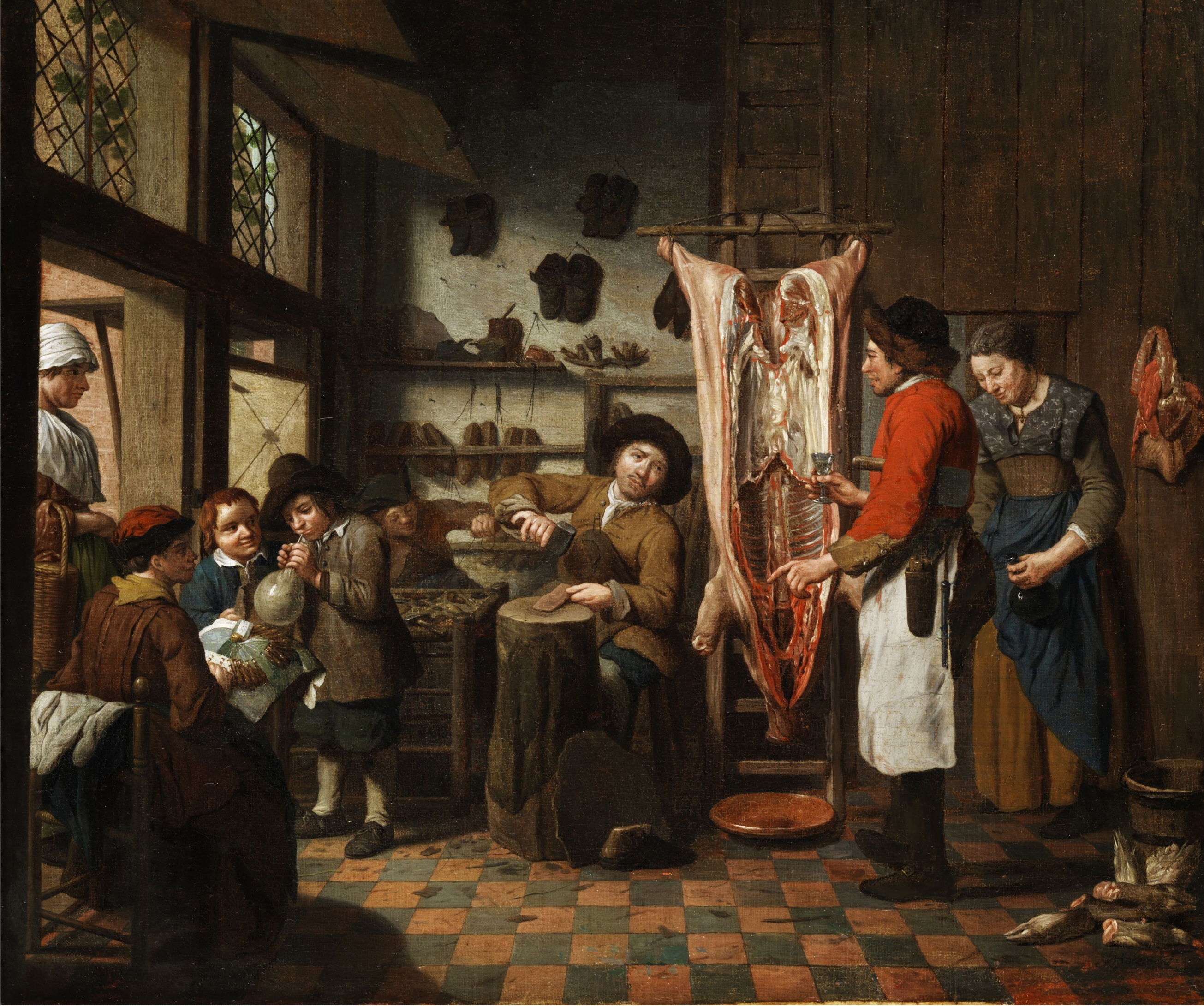 Werkstattinterieur mit einem Schuhmacher, einem Metzger, einer Klöpplerin und einem Jungen, der eine Saublase aufbläst